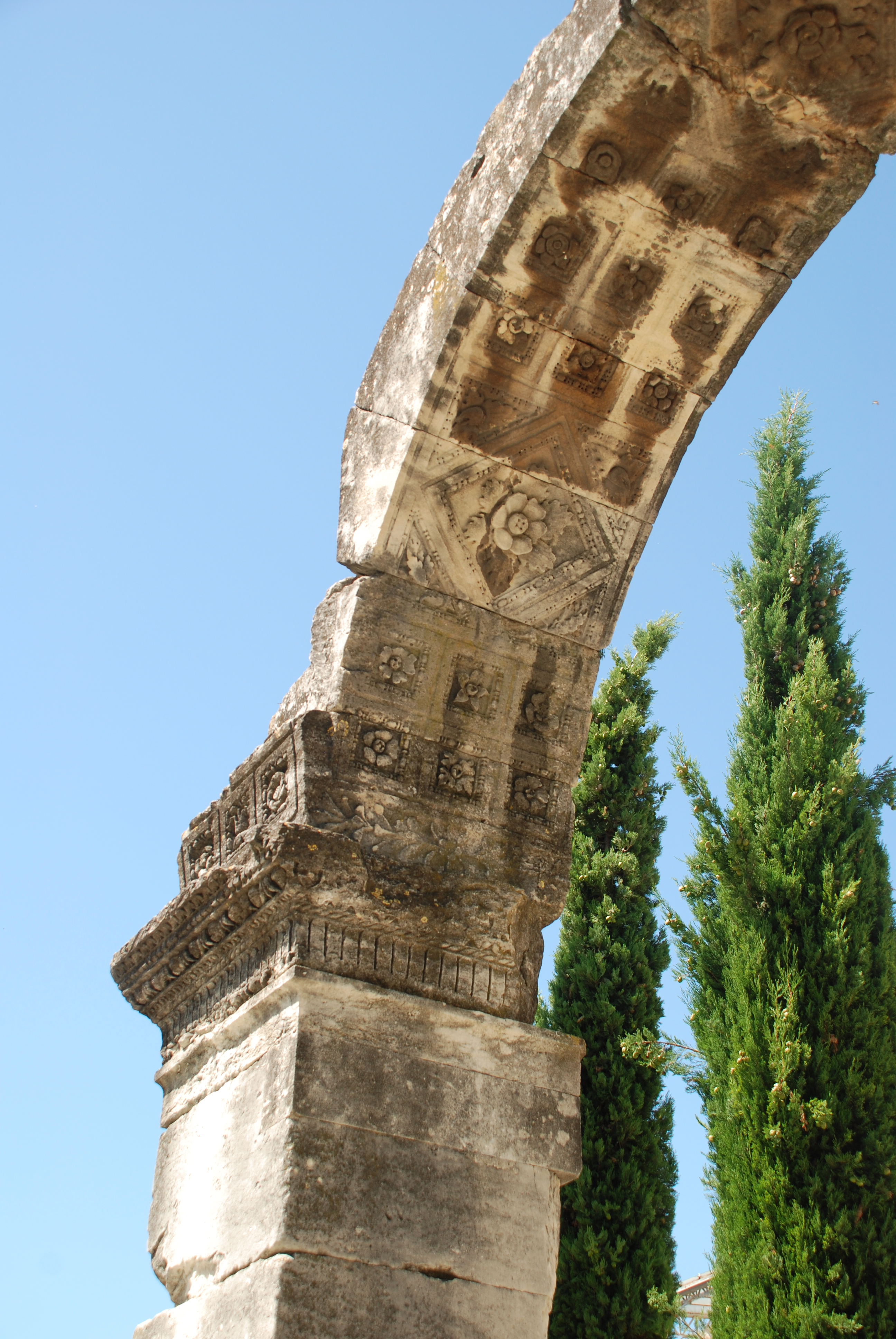 France - Provence - Vaucluse - Arc antique de Cavaillon